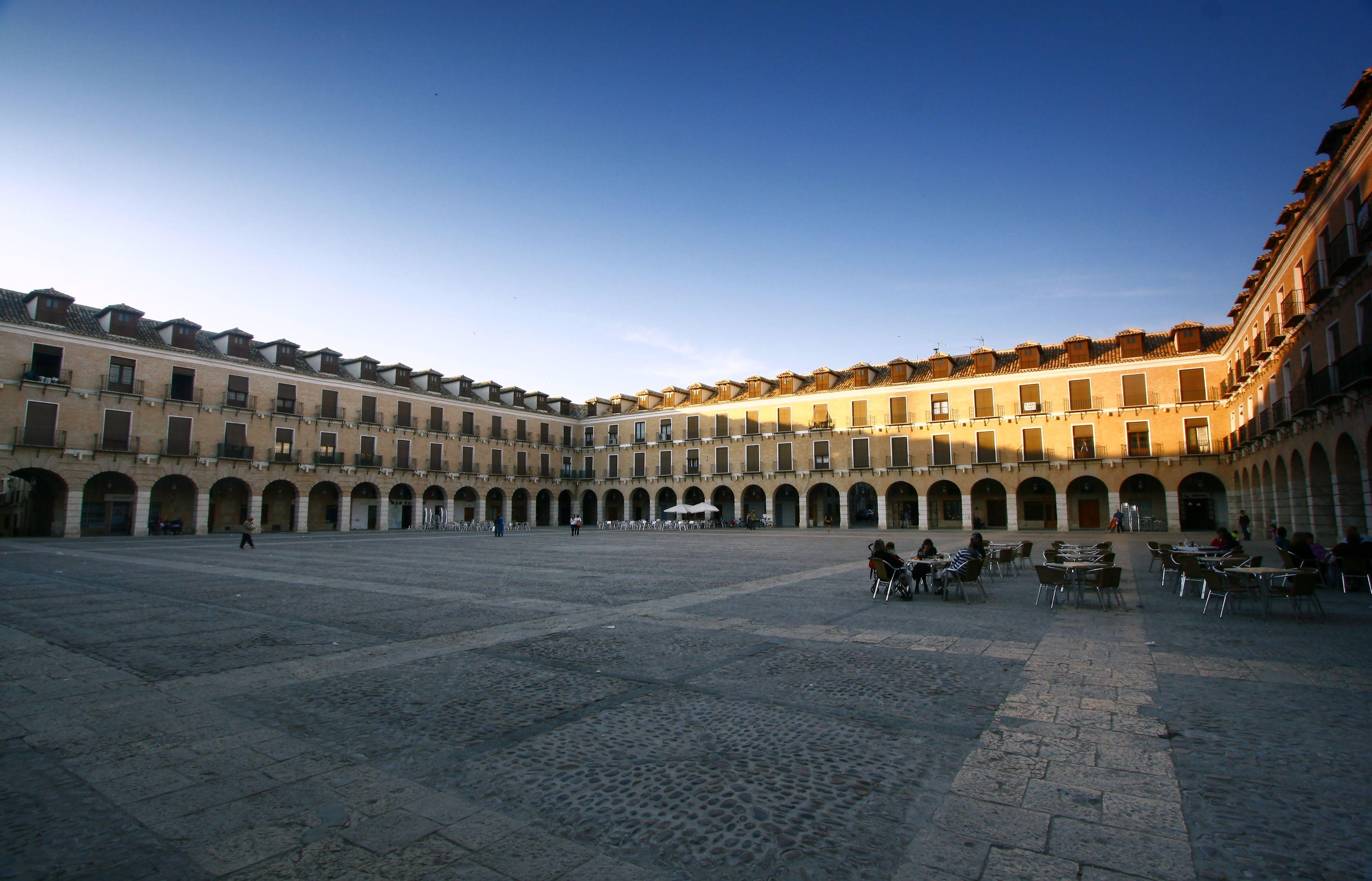 Plaza Mayor de Ocaña, Toledo, Castilla-La Mancha, España.